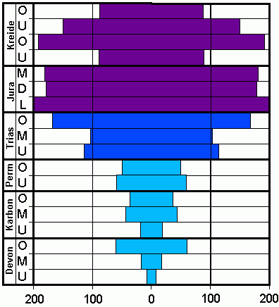 Schema der Verteilung von rund 1500 Ammonitengattungen von Devon bis Kreide. Datenquelle: Lehrbuch der Paläozoologie Bd. II, Teil 2, S. 204, Grafik aus den dort gemachten Angaben selbst erstellt also jetzt gemeinfrei.